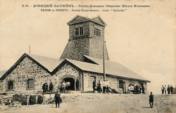 Русско-Донецкое общество. Шахта Итальянка